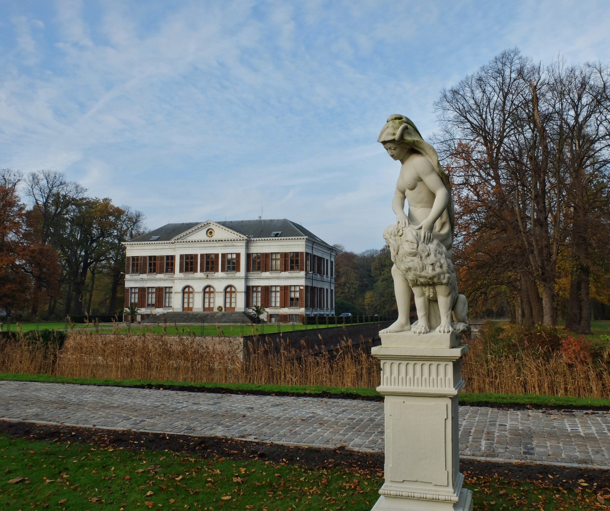 Zicht op kasteel Schoonselhof dat zich nu bevindt op de gelijknamige begraafplaats van Antwerpen